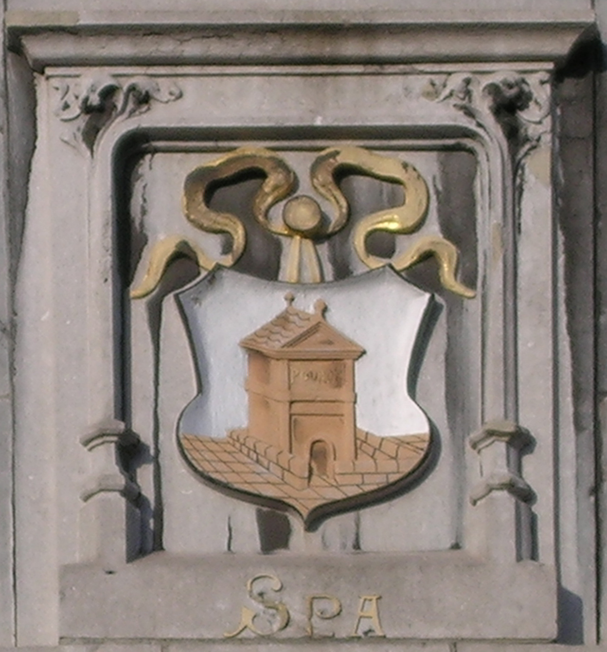 Armes de Spa a la façade de la gran'poste à Liège - Escut d'Spa a l'antic correus de Lieja